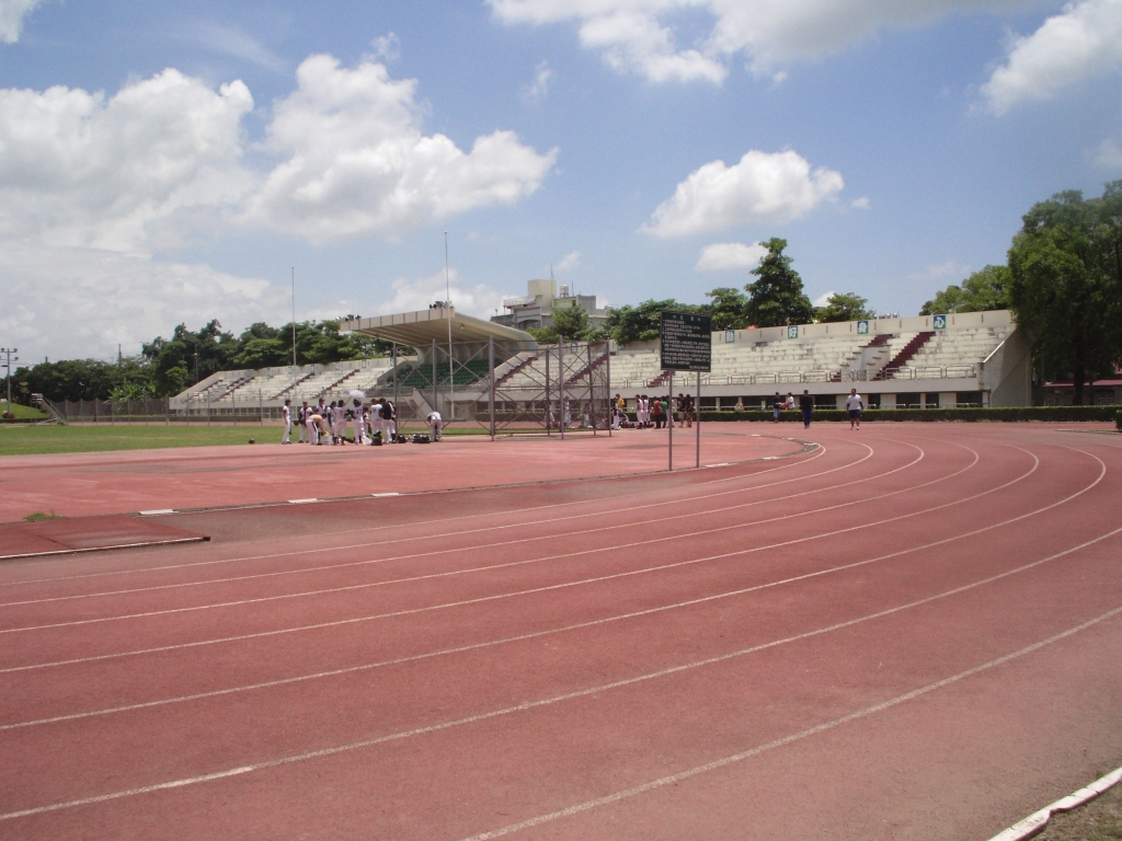 國立虎尾科技大學操場。